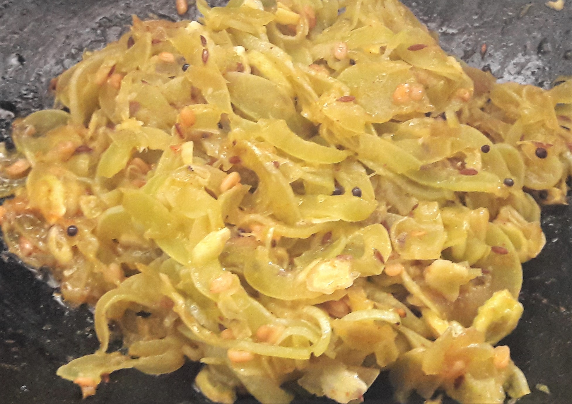 పొట్లకాయ పోపు కూర